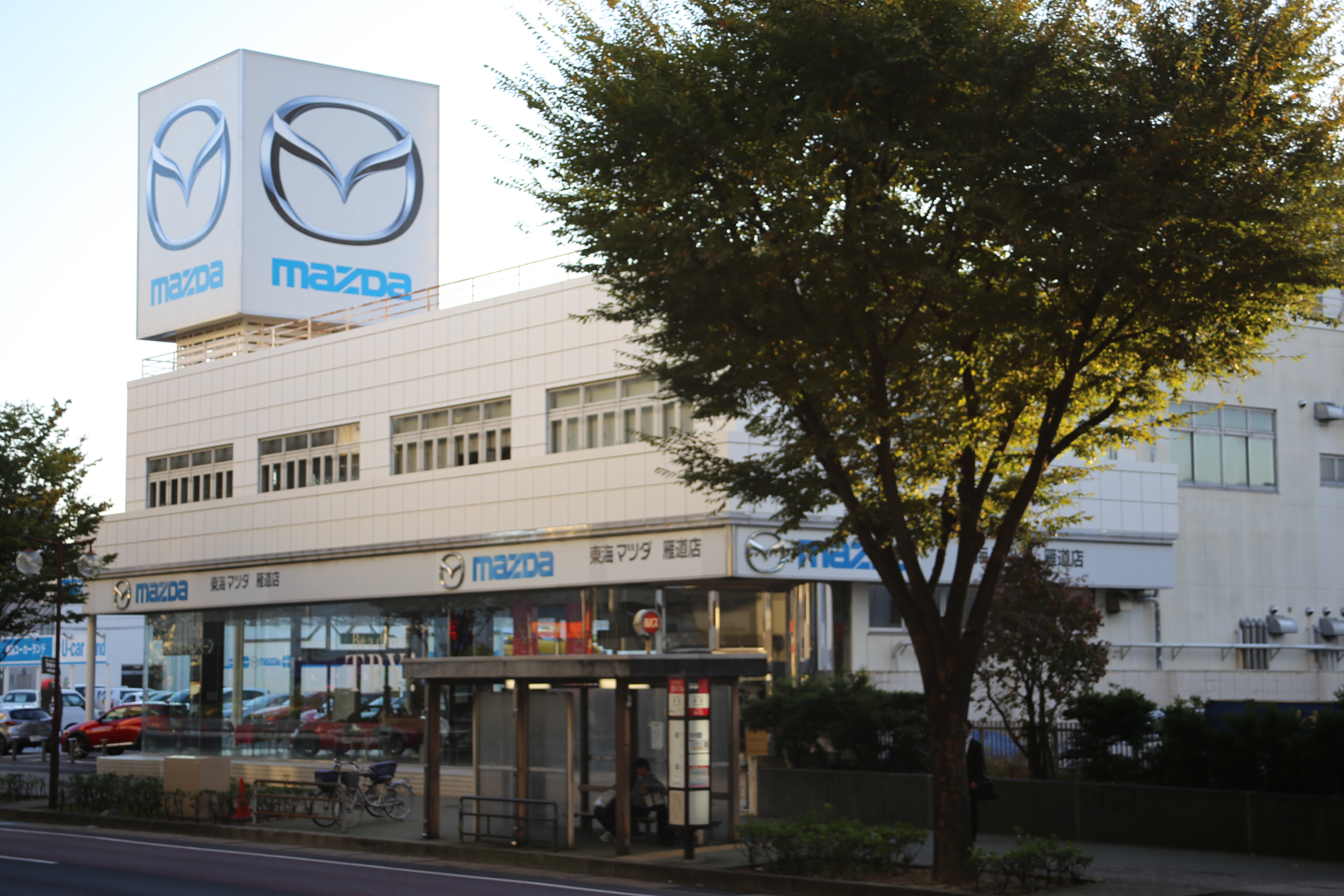 名古屋市瑞穂区二野町の東海マツダ販売本社（東海マツダ雁道店）を東側公道北側中央分離帯自転車置き場より撮影